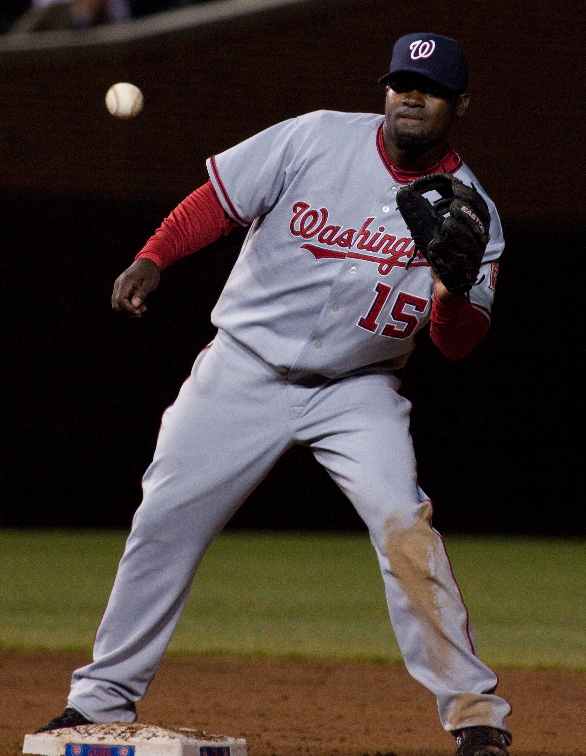 Cristian Guzmán